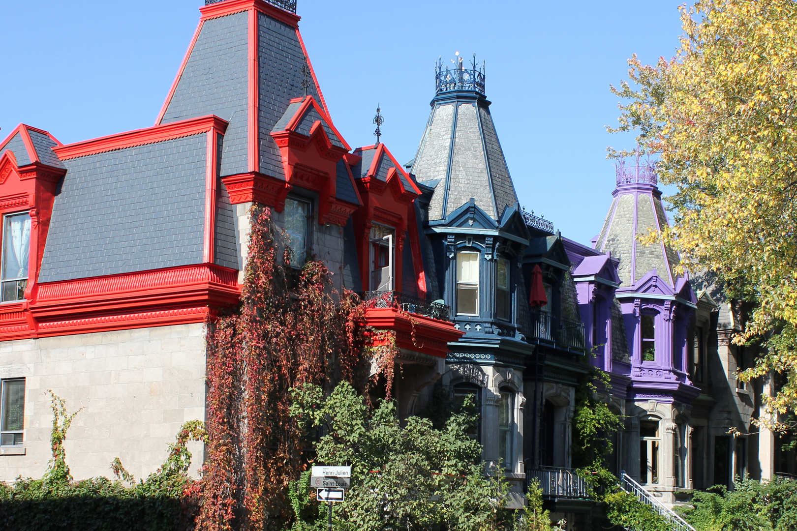 Maisons du Carré Saint-Louis